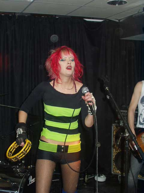 En bild på Toril Lindqvist Alice in Videoland när de spelade på Klubb Utopi i Skövde